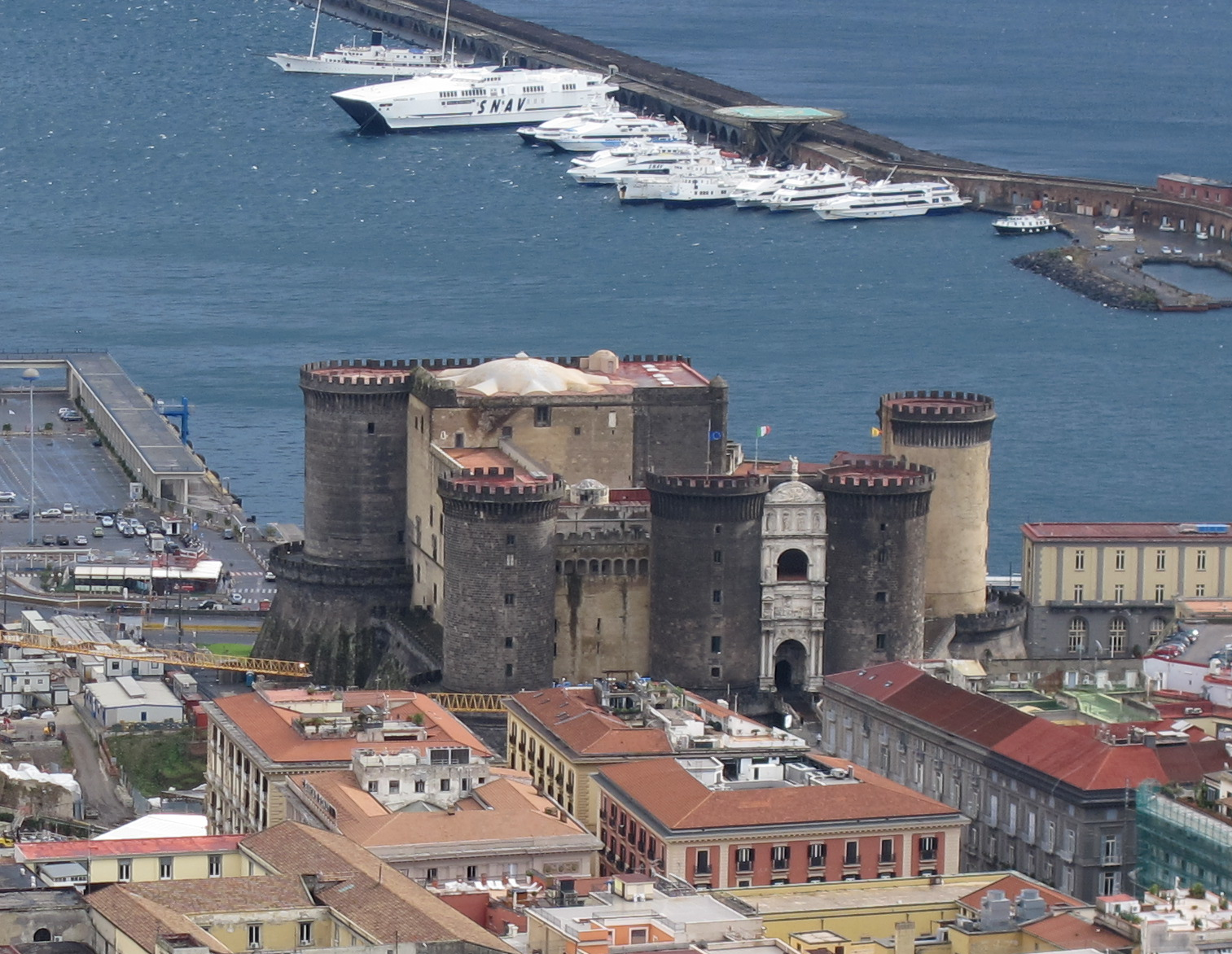 Napoli